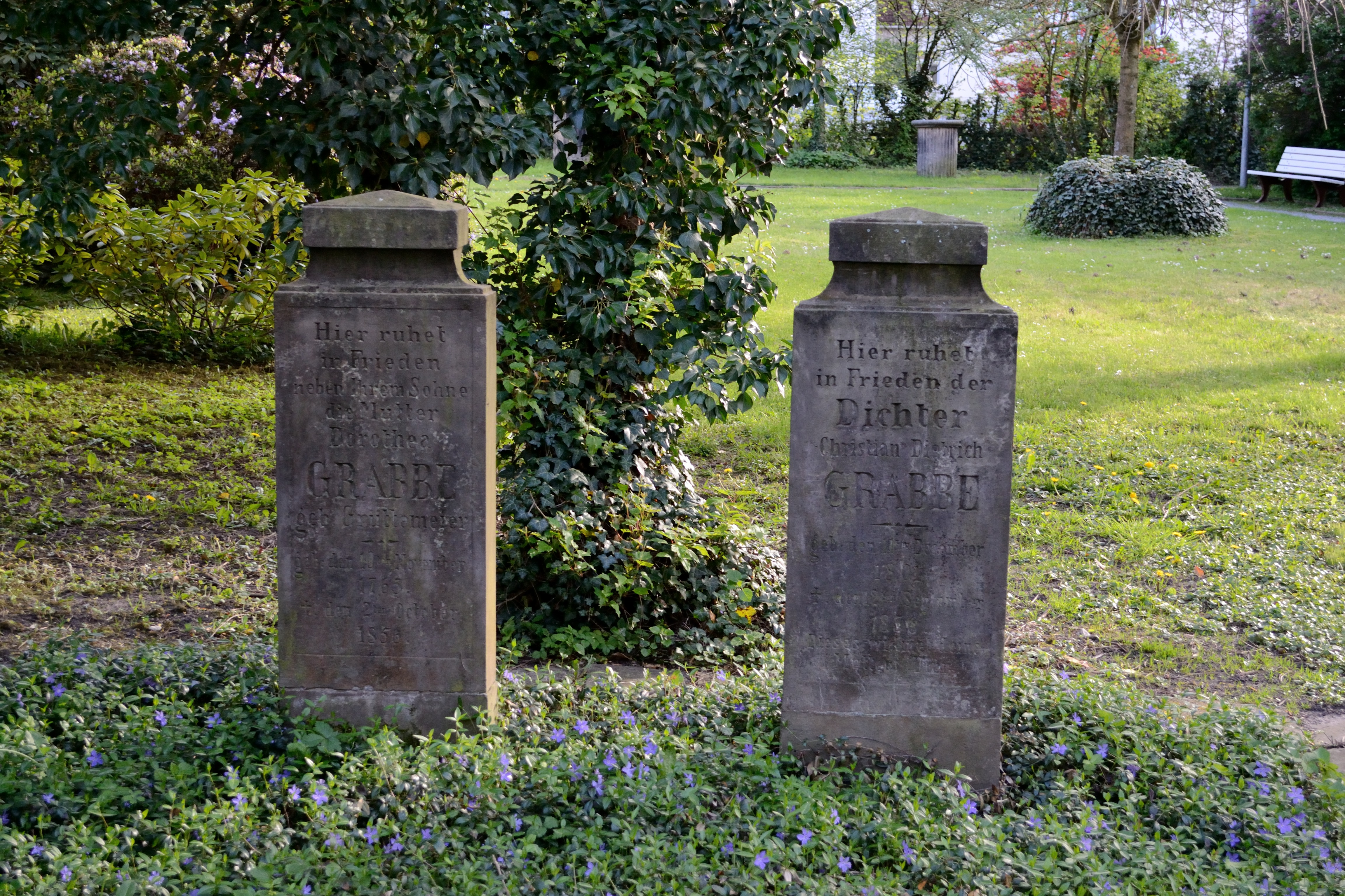 Grabdenkmäler Dorothea Grabbe, geb. Grüttemeier (1765–1856) und Christian Dietrich Grabbe (1801–1836)